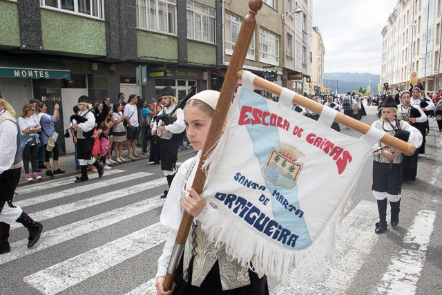 La Escola de gaitas de Ortigueira durante el desfile de bandas del Festival de Ortigueira 2017